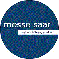 kl